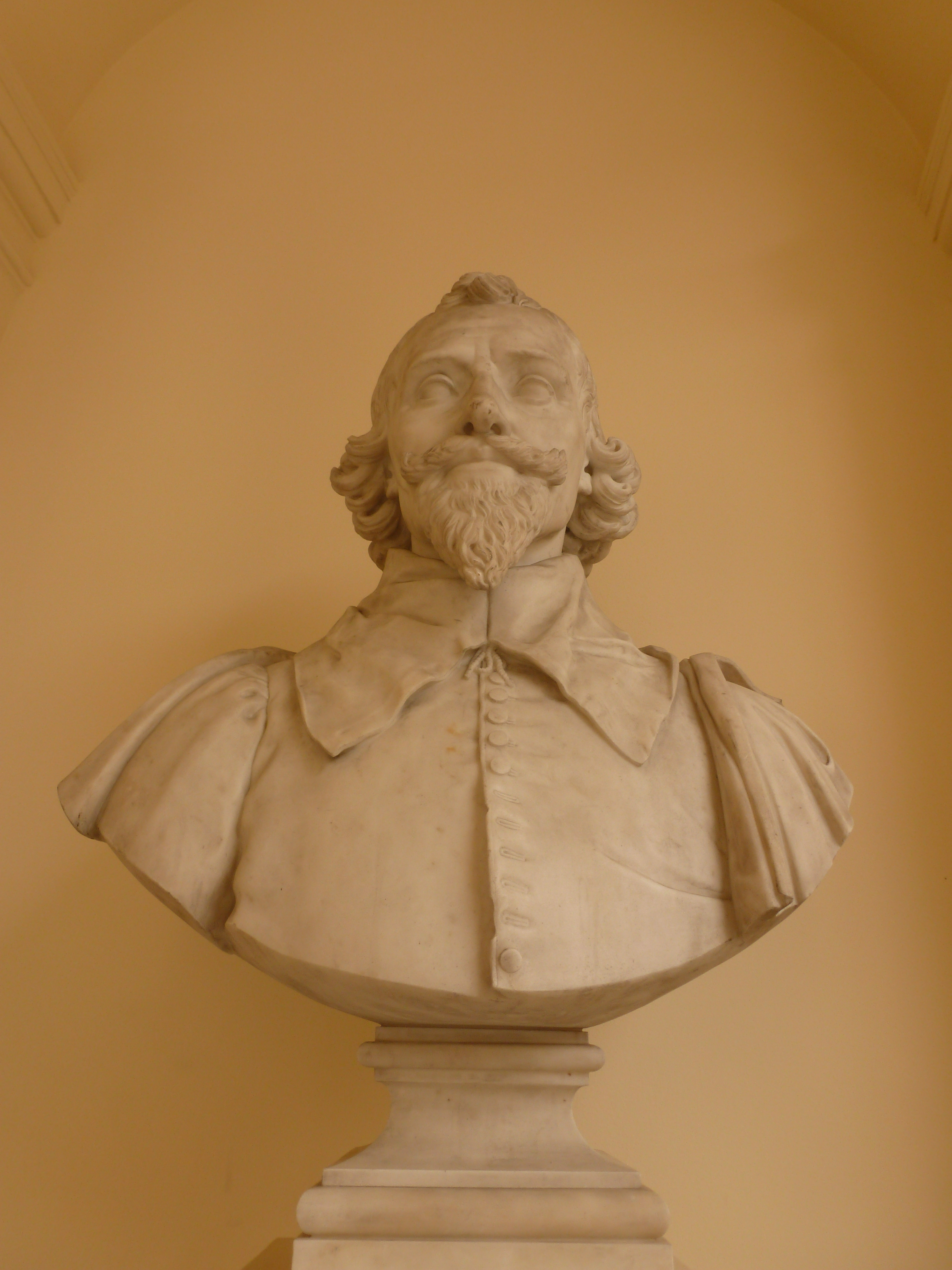 Buste de Gabriel Naudé, à l'Institut de France